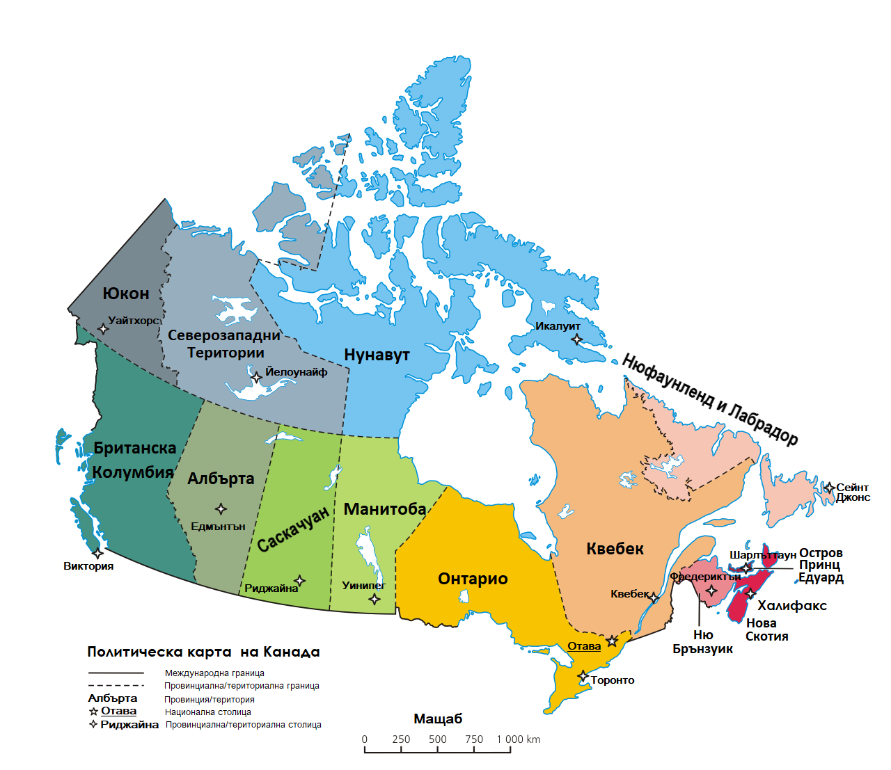 Провинции и територии на Канада